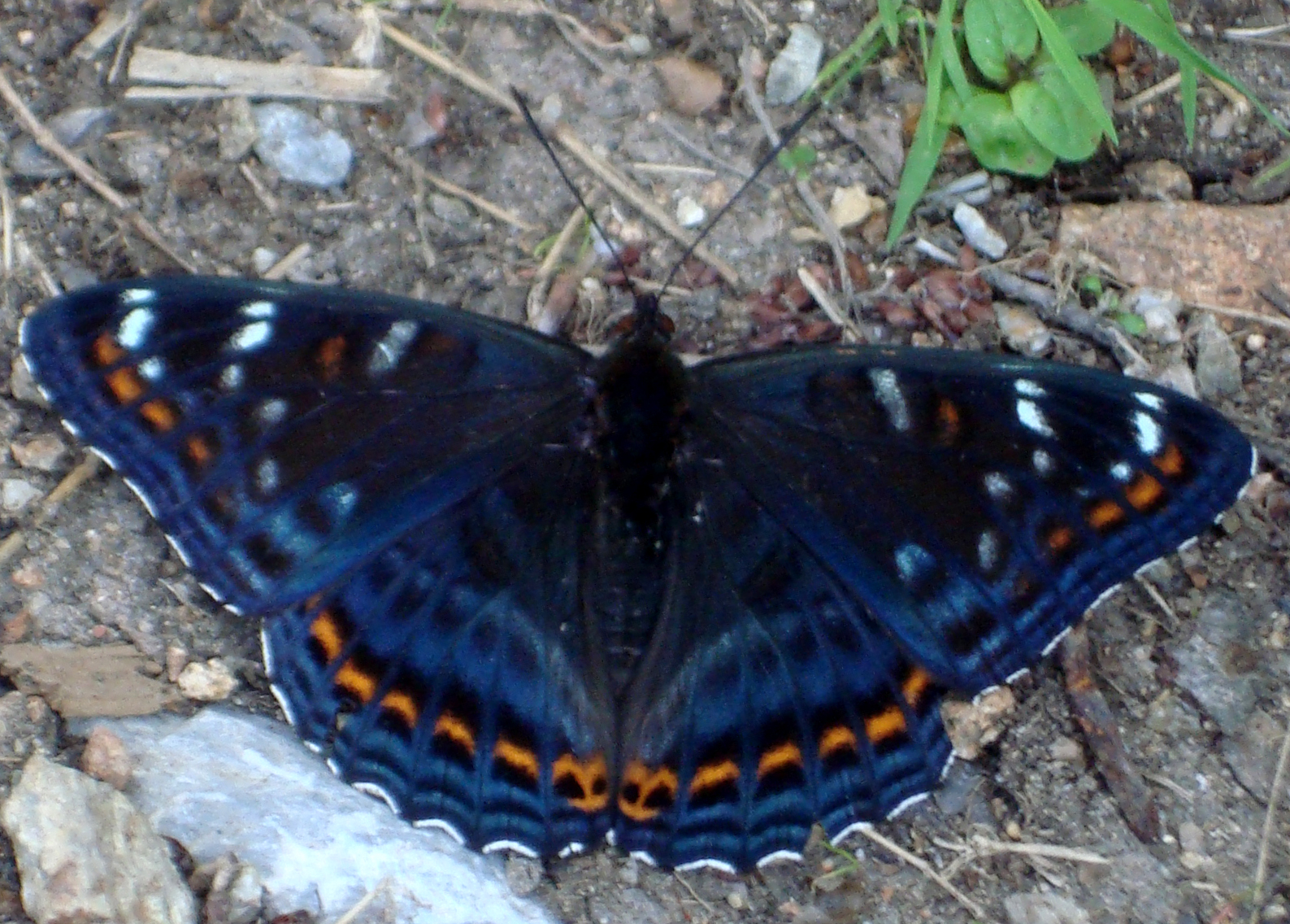 Limenitis populi